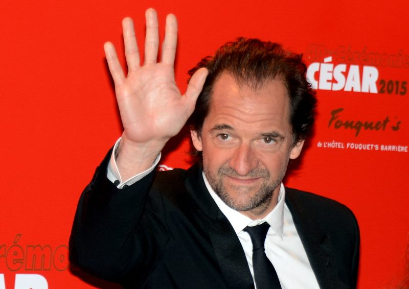 Stéphane De Groodt à la cérémonie des César